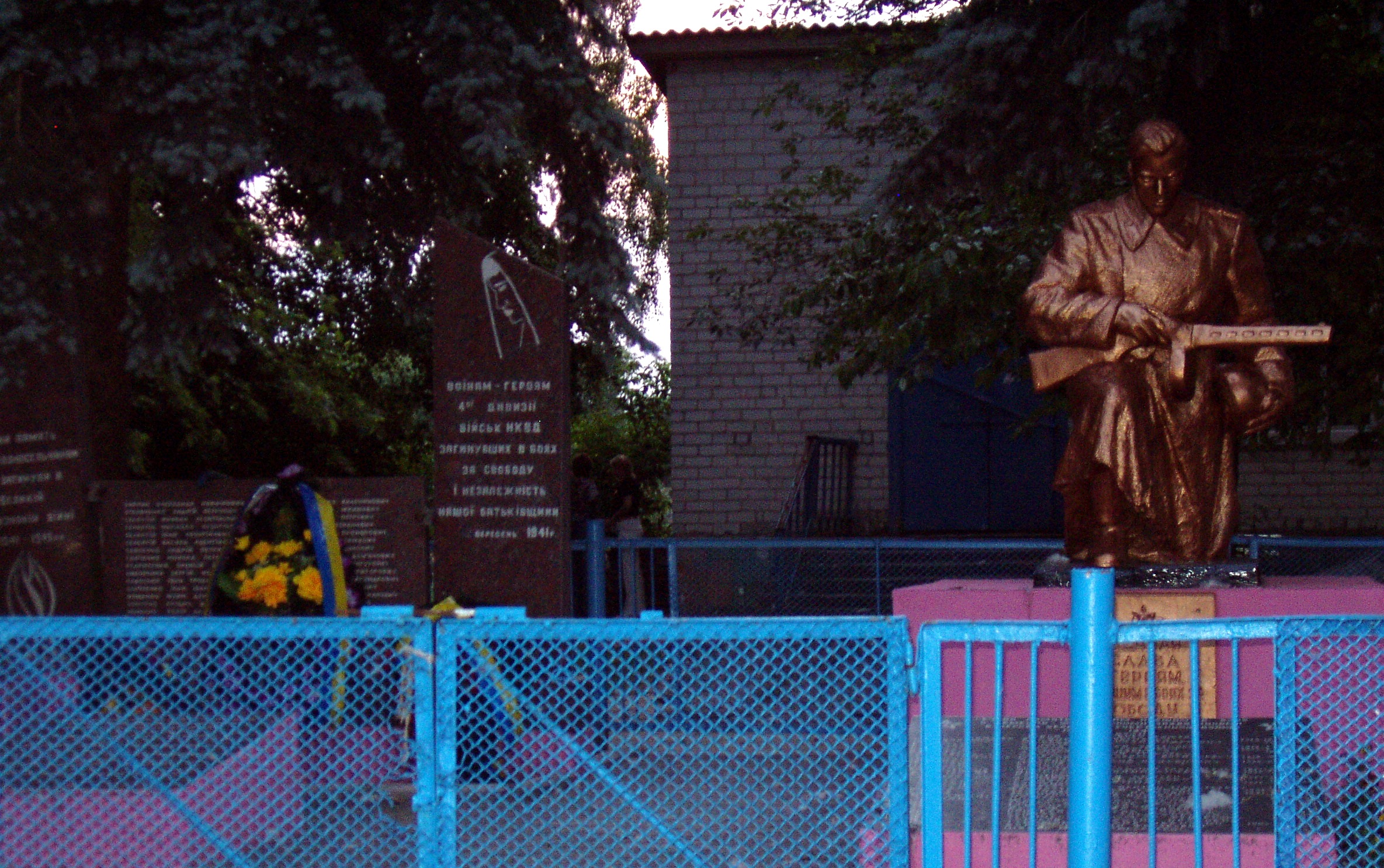 Братська могила воїнів Радянської Армії, серед яких Герой Радянського Союзу, і пам'ятник воїнам-односельцям, які загинули в роки Великої Вітчизняної війни, село Велика Олександрівка, вул. Гагаріна 1